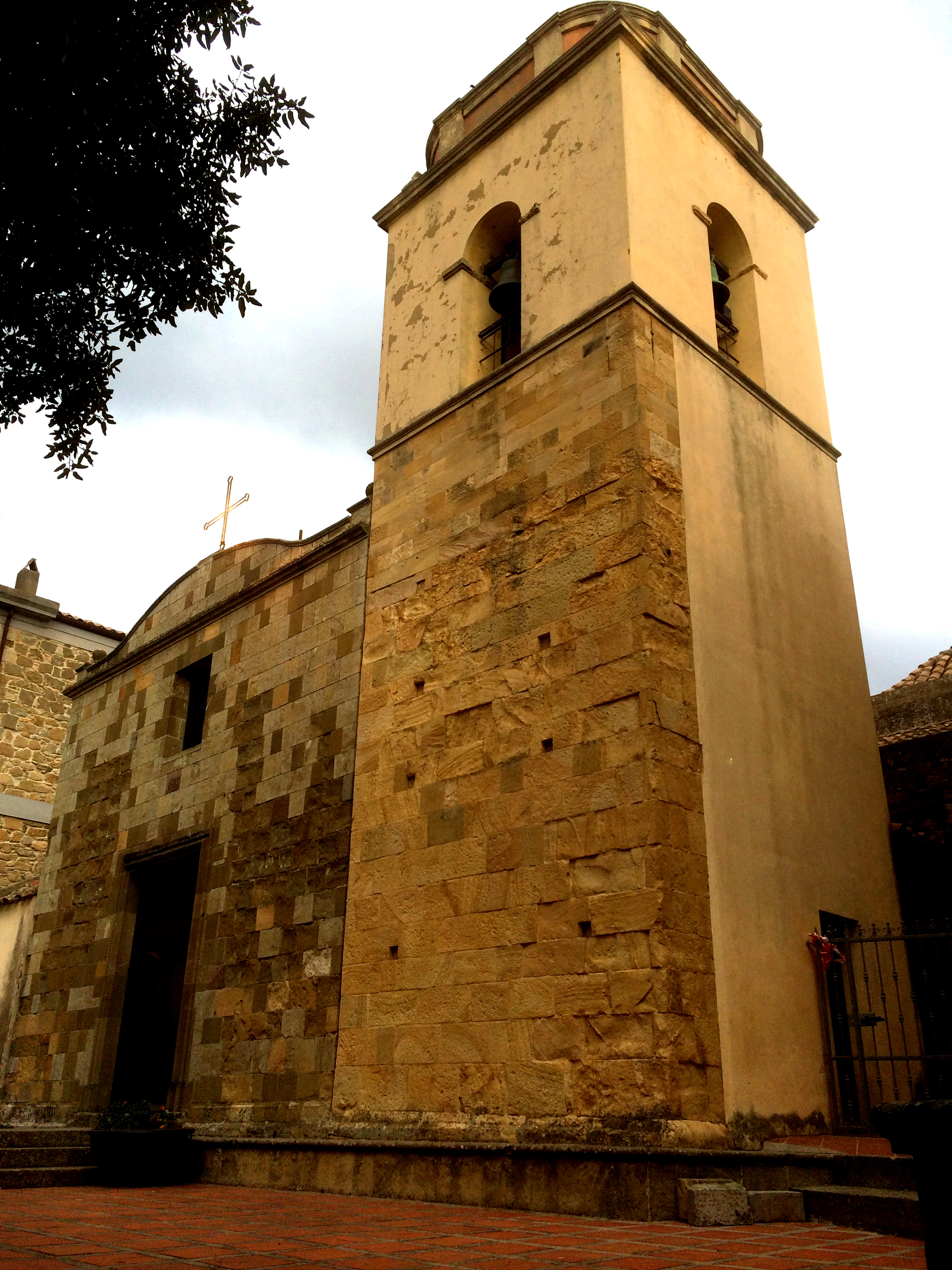 Chiesa parrocchiale di San Francesco This is a photo of a monument which is part of cultural heritage of Italy.